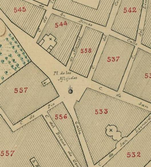 Plano topográphico de la Villa y Corte de Madrid al Excmo. Sr. Conde de Aranda, Capitán General de los Exércitos y Presidente del Consejo. Dibujado y gravado por Don Antonio Espinosa de los Monteros y Abadía en 1769.